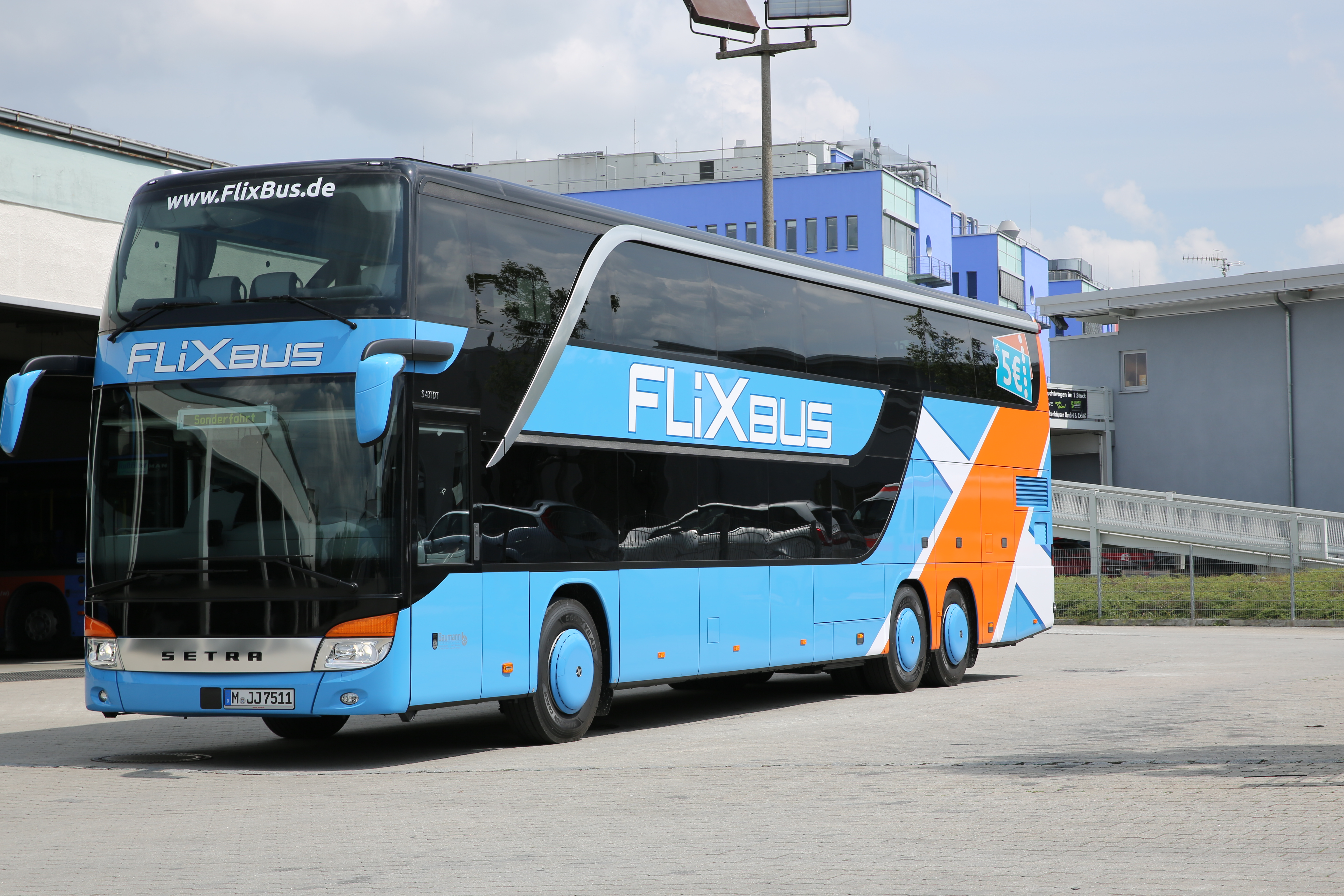 Deitsch: Doppeldeckerbus von FlixBus